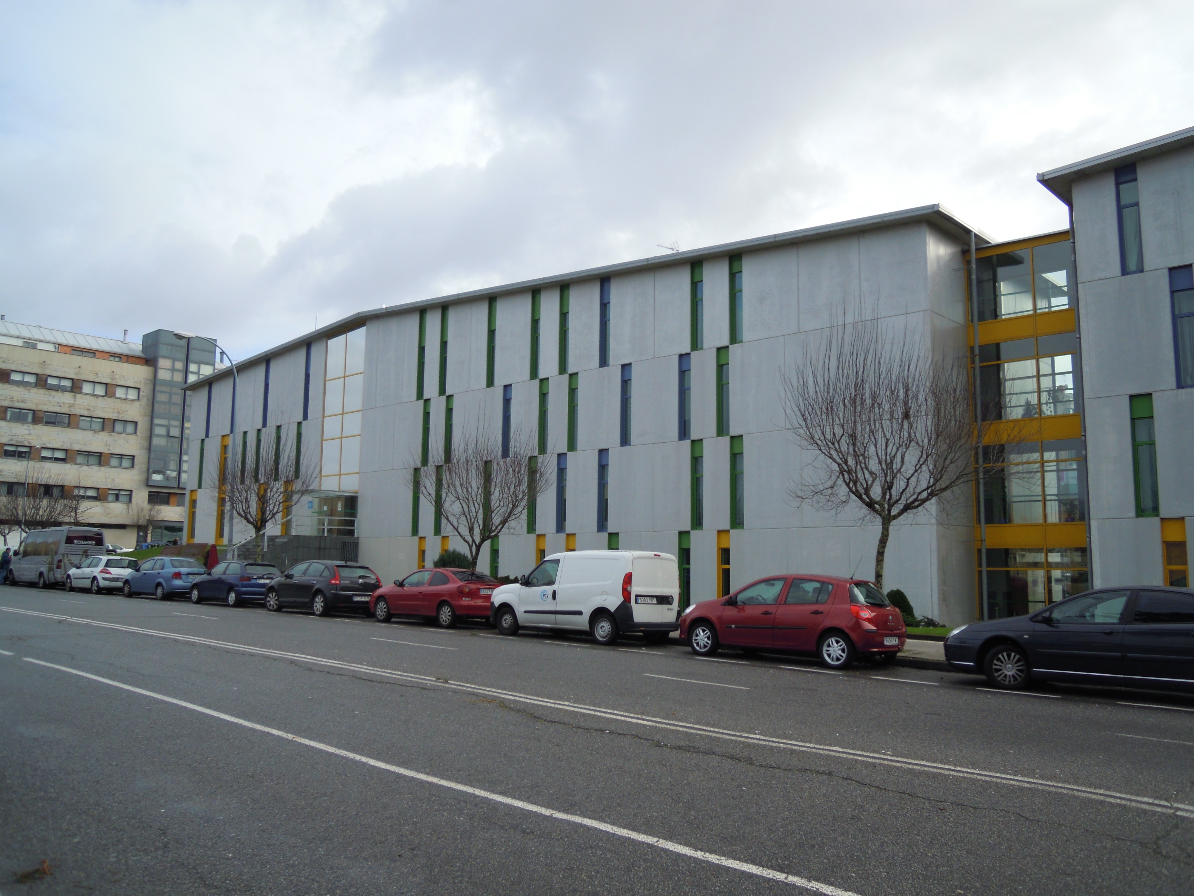 Conservatorio de Pontevedra capital